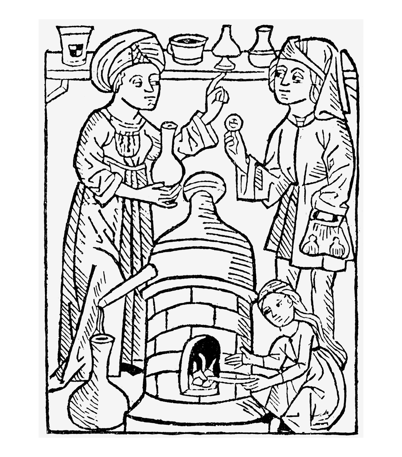 Titelbild Puss 1498